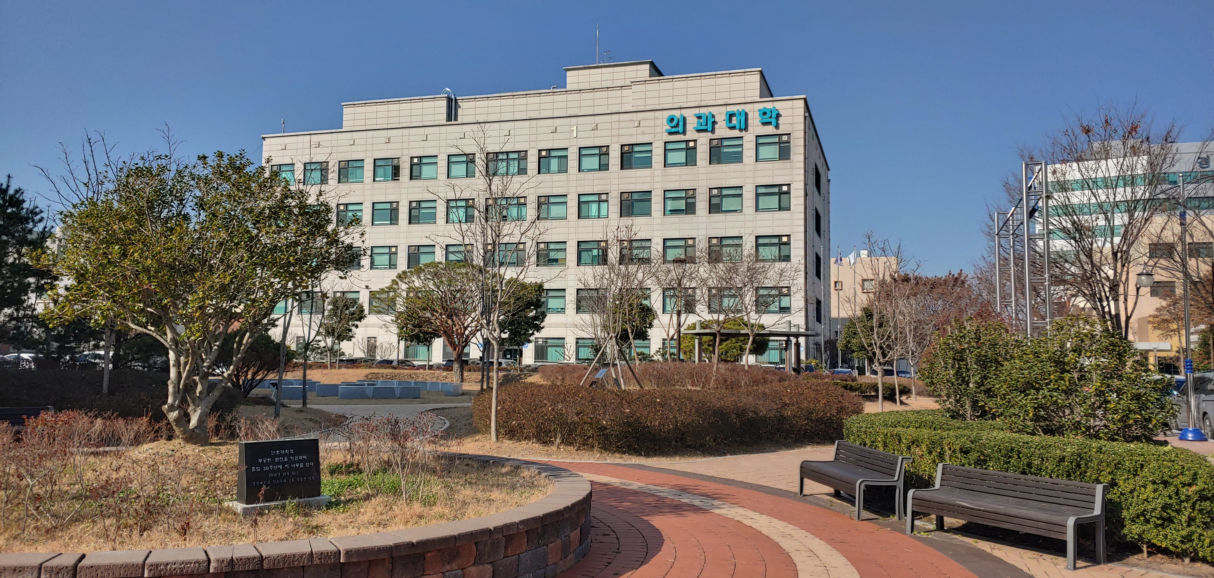 경상대학교 의과대학